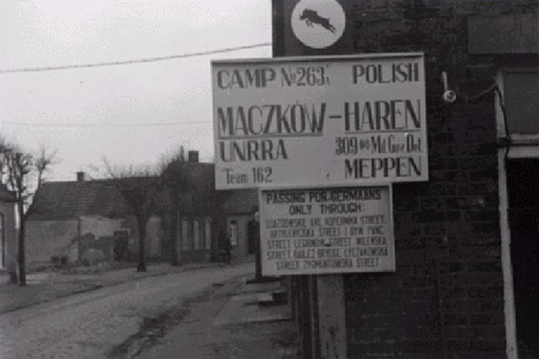 Maczków - polska enklawa w okupowanych Niemczech.